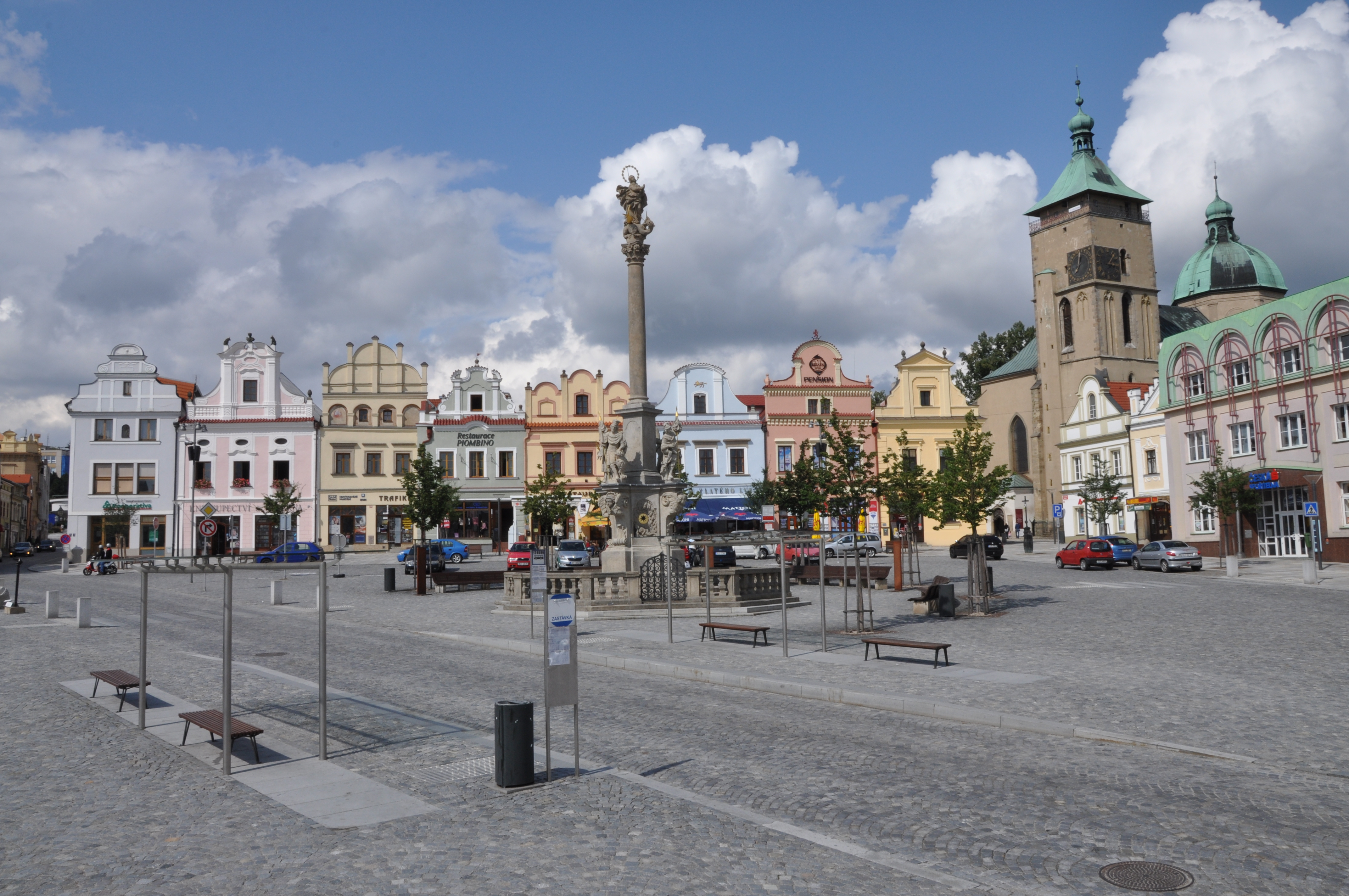 Střed Havlíčkova náměstí a Barokní morový sloup z roku 1717. V horní části Měšťanské domy a vpravo kostel Nanebevzetí Panny Marie. Město Havlíčkův Brod. Kraj Vysočina. Czech Republik.